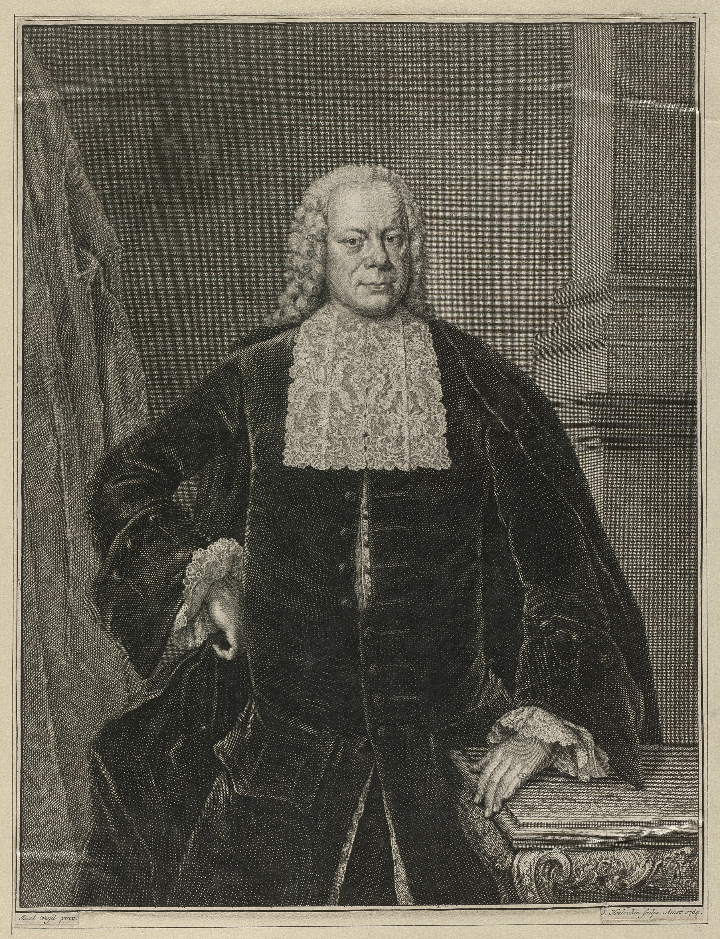 CollectieVoorhelm SchneevoogtInventarisnummerNL-HlmNHA_1477_53010419BeschrijvingPortret, kniestuk, van Christianus Gabriel de Schroeder, burgemeester van Gdansk, met zijn linkerhand rustend op een tafel naast hem. Rechts op de achtergrond een zuil en links een gordijn.Ets en gravure door Jacob Houbraken naar schilderij van Jakob Wessel, gesigneerd en gedateerd.FotonummerNL-HlmNHA_1477_53010419DocumenttypePortrettenVervaardigerHoubraken, Jacob (1698-1780), Wessel, Jakob (1707-1780) AnnotatiesHet familiewapen en zijn naam en gegevens in vier regels in het Latijn onder het portret ontbreken.PersonenSchröder, Christian Gabriel von (1692-1762) Begindatum1764Einddatum1764TechniekGrafiek Drukwerk